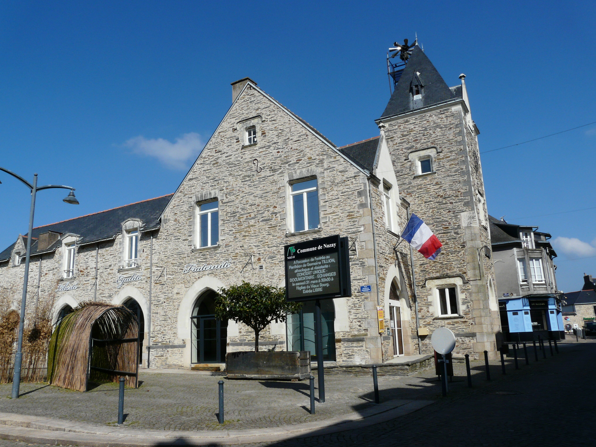 Vue d'ensemble de la Mairie de Nozay (côté Ouest)